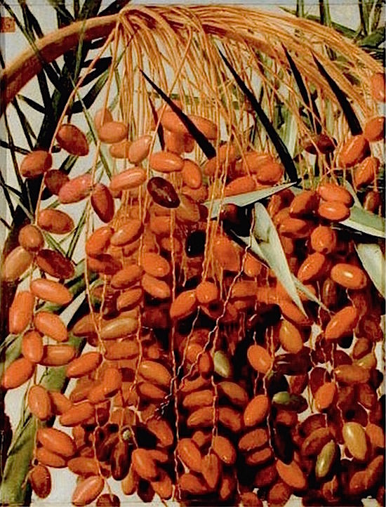 Michel Garnier (1753–1829): Früchte der Echten Dattelpalme (Phoenix dactylifera). Eines von 140 Bildern tropischer Nutzpflanzen, die der Künstler auf Mauritius malte, wo er sich 1801–1809 aufhielt. Öl auf Papier, auf Leinwand geklebt, ca. 56 x 46 cm. Muséum national d’histoire naturelle, Paris.